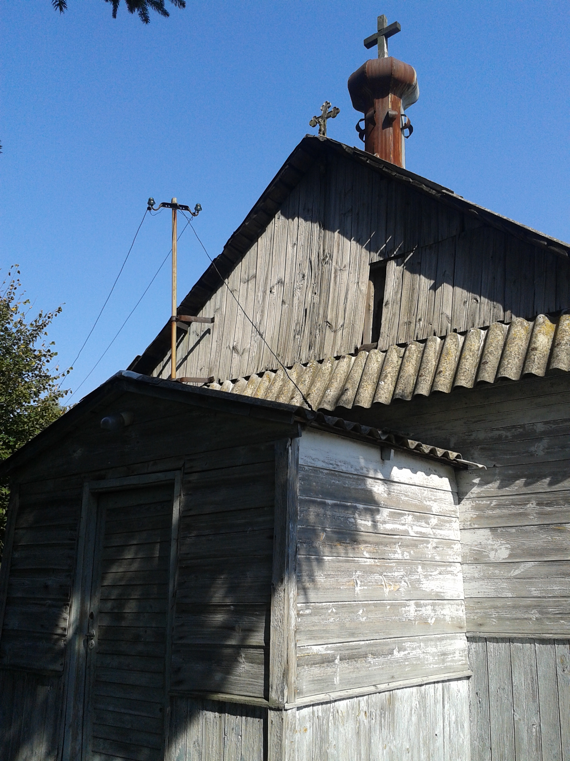 Elewacja cerkwi św. Jana Teologa - świątyni cmentarnej, dawnej parafialnej, w Kopytowie